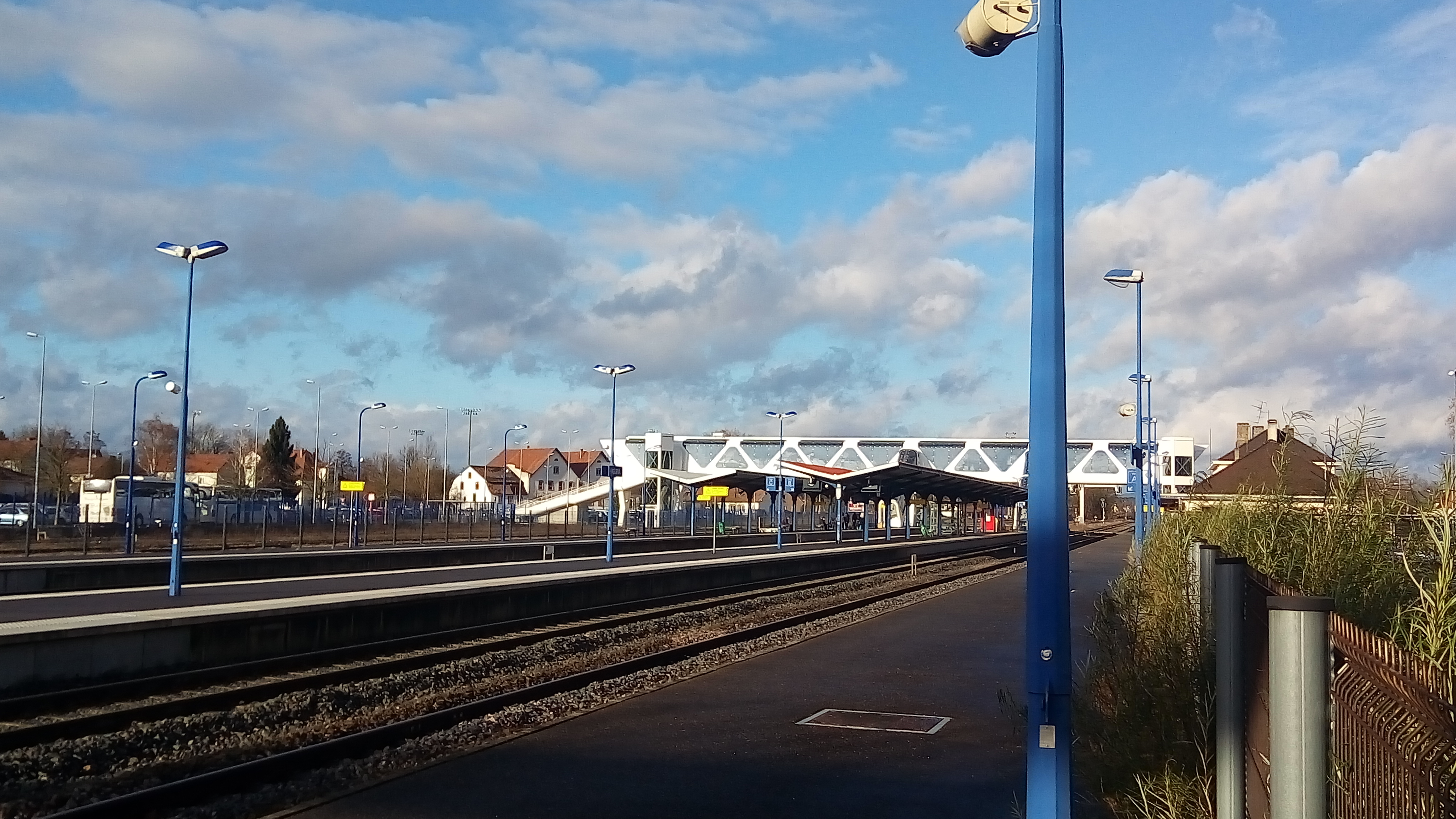 Gare de Haguenau avec sa nouvelle passerelle (2017)